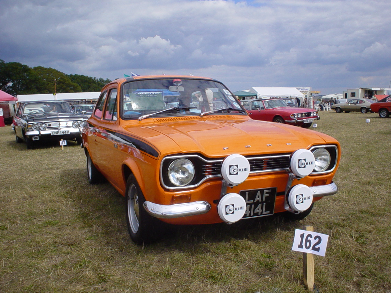 Ford Escort RS2000 Mexico